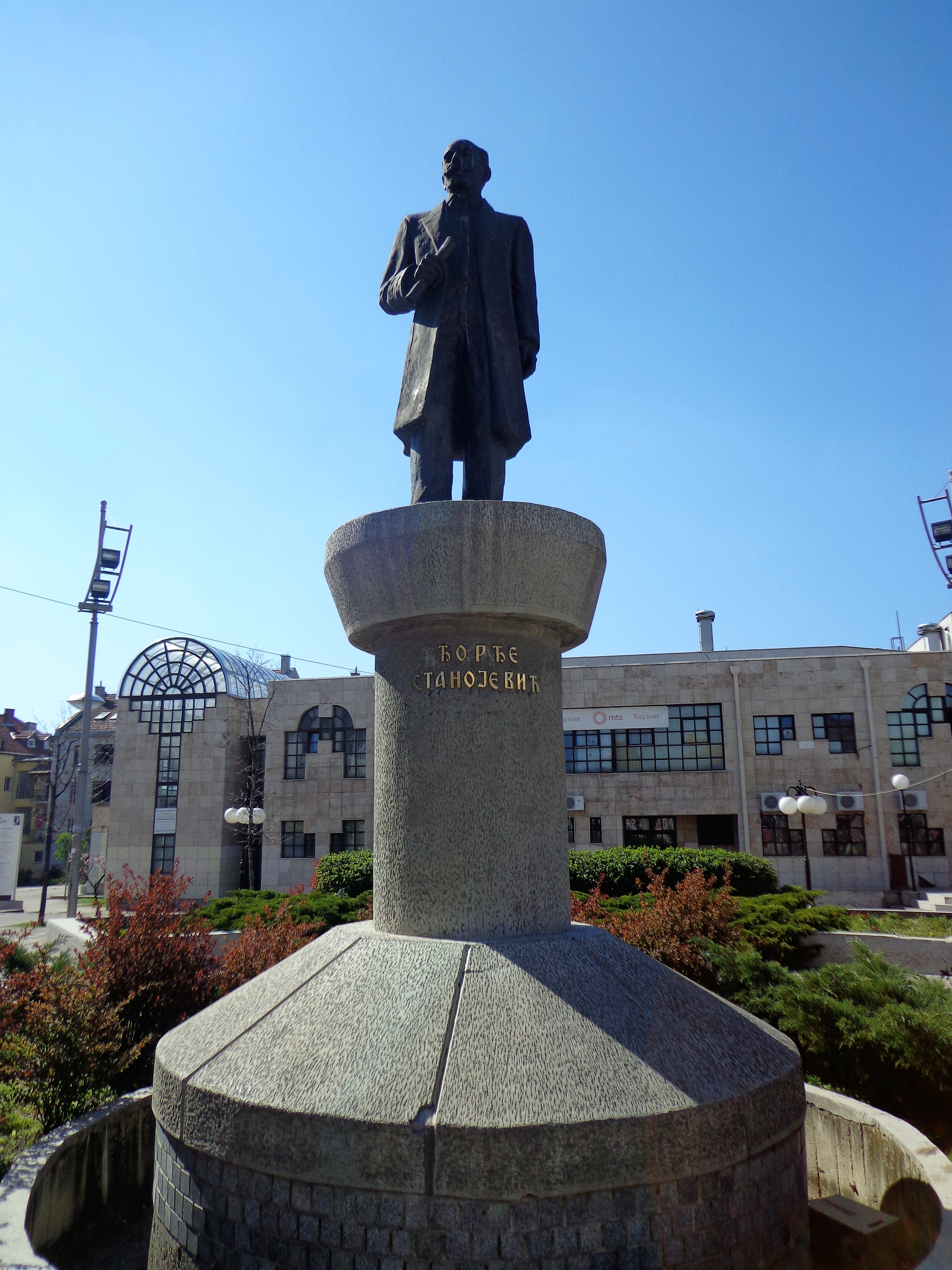 Bista Đorđa Stanojevića u Negotinu na istoimenom trgu.